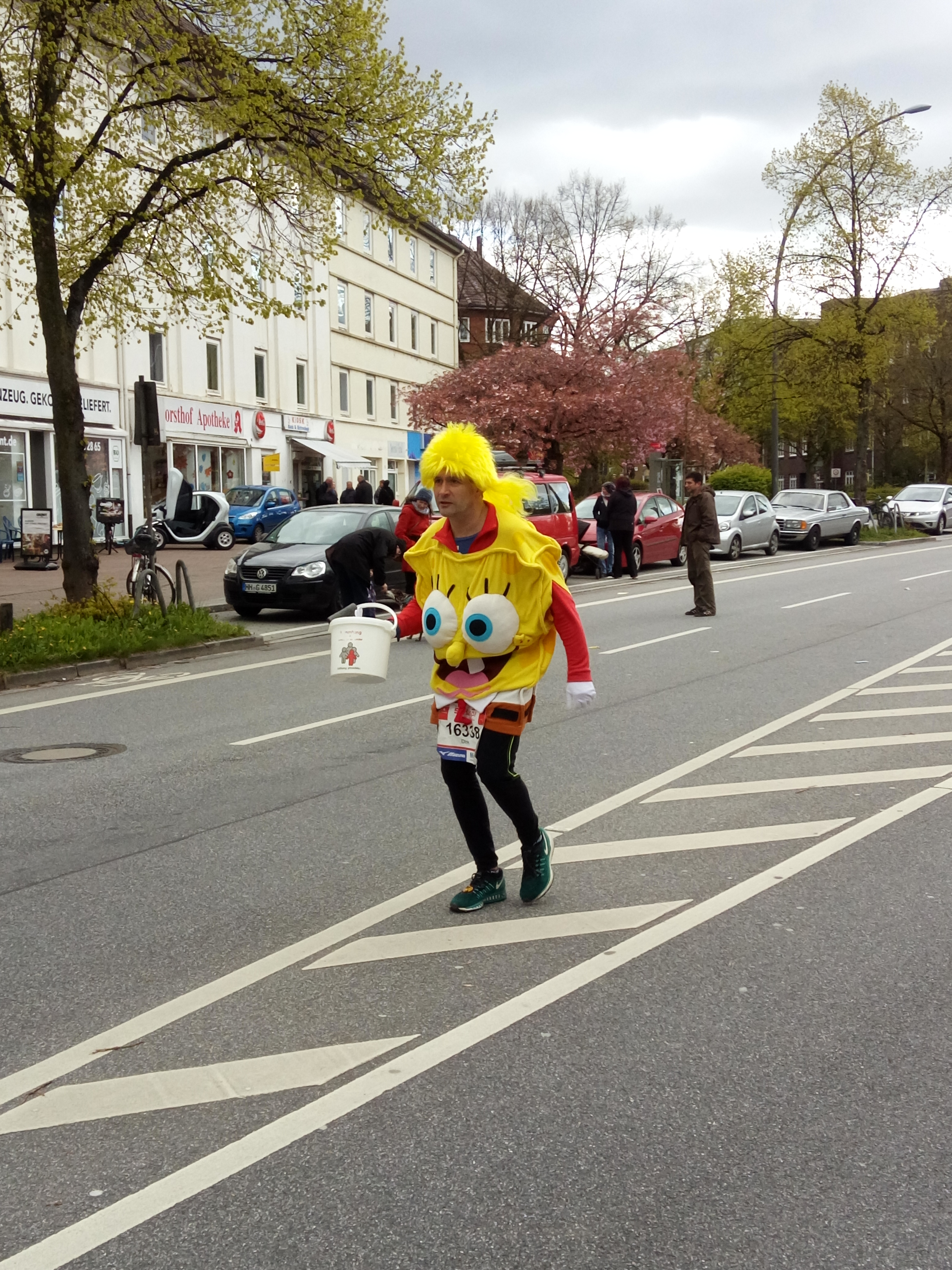 Eines der Letzten, SpongeBob.